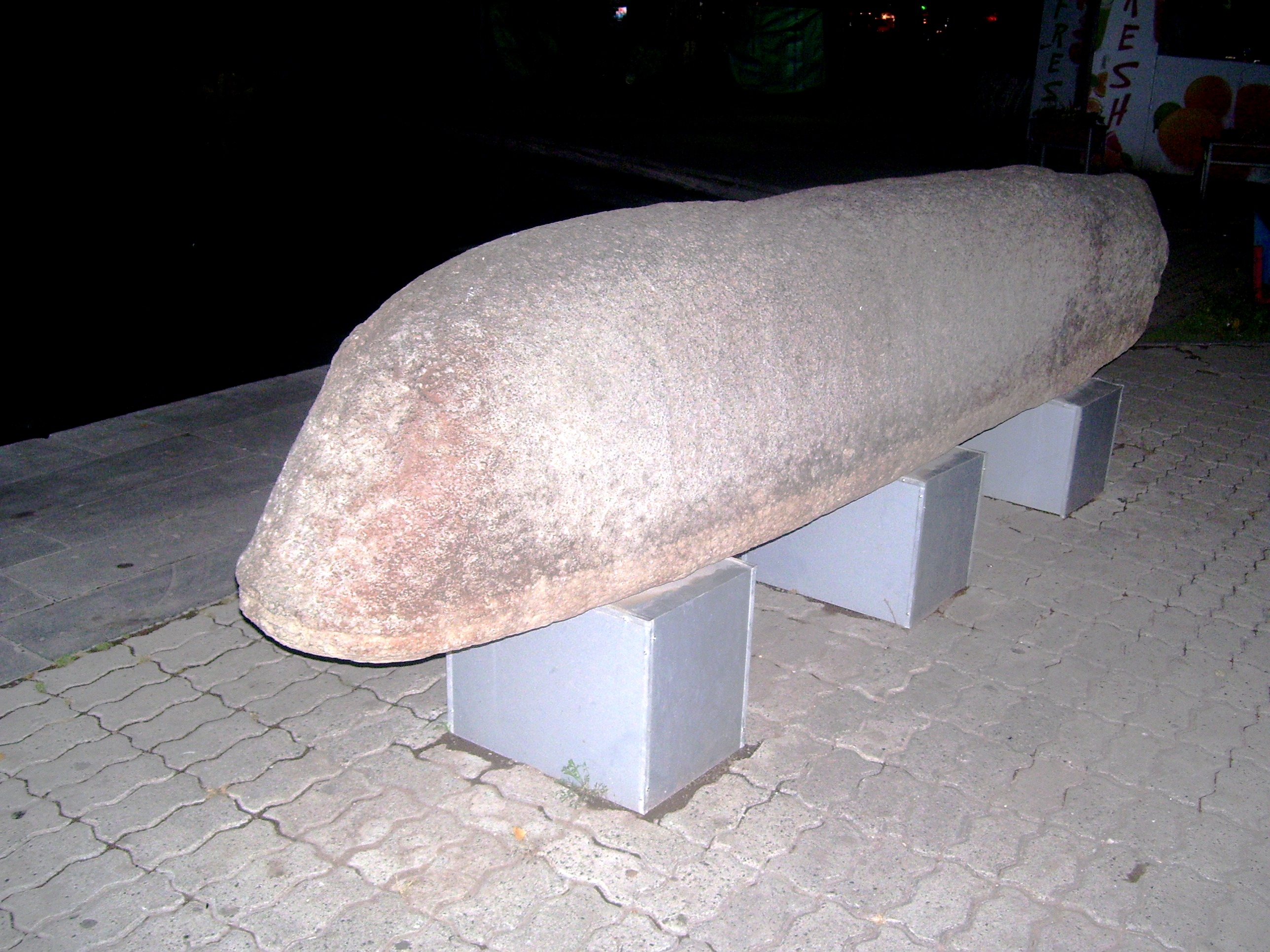 Վիշապաքար մթա 3-2 հզմ Օղակաձև զբոսայգի, «Ալ առագաստներ» սրճարանի մոտ 6/169